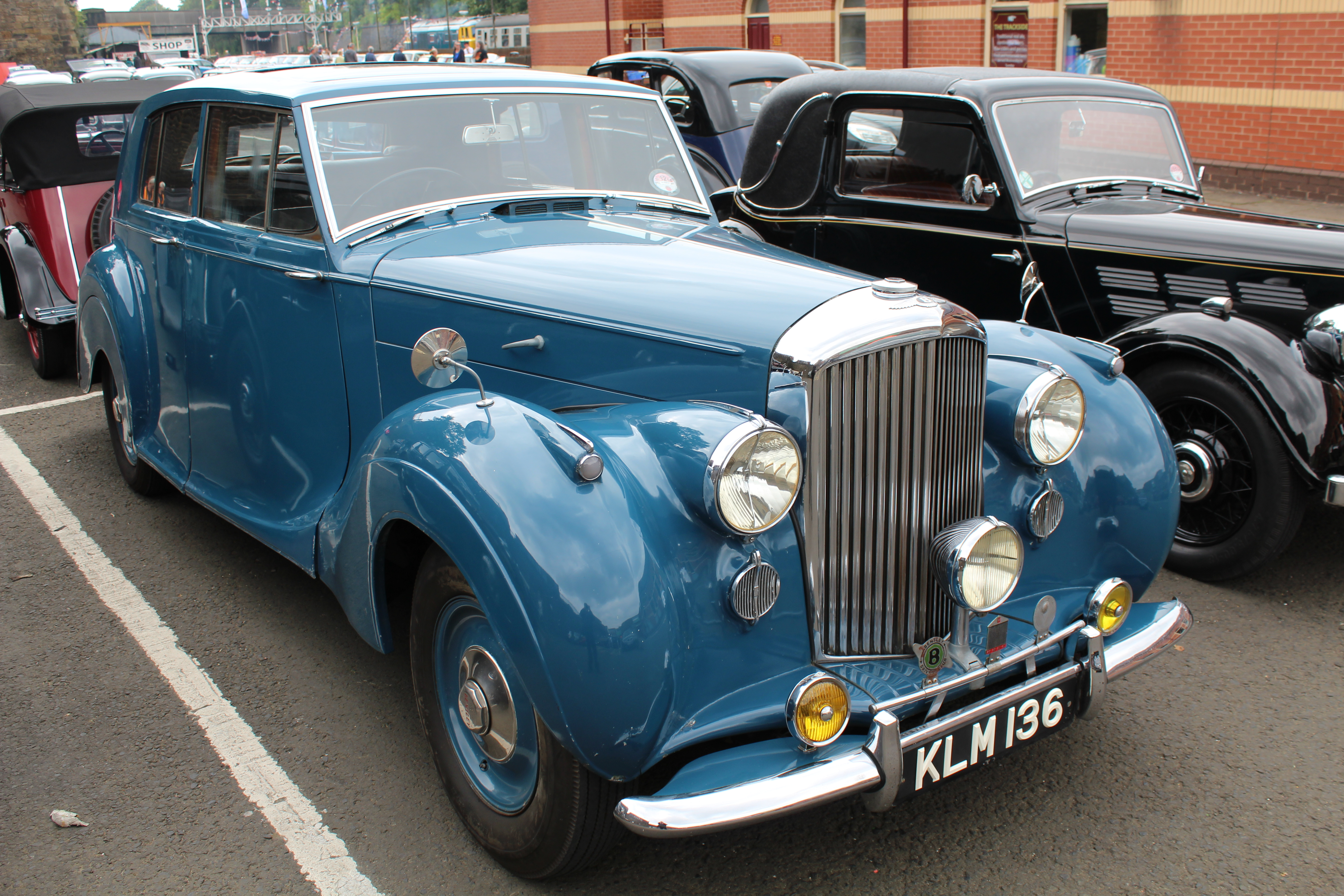 maybe Hooper bodywork